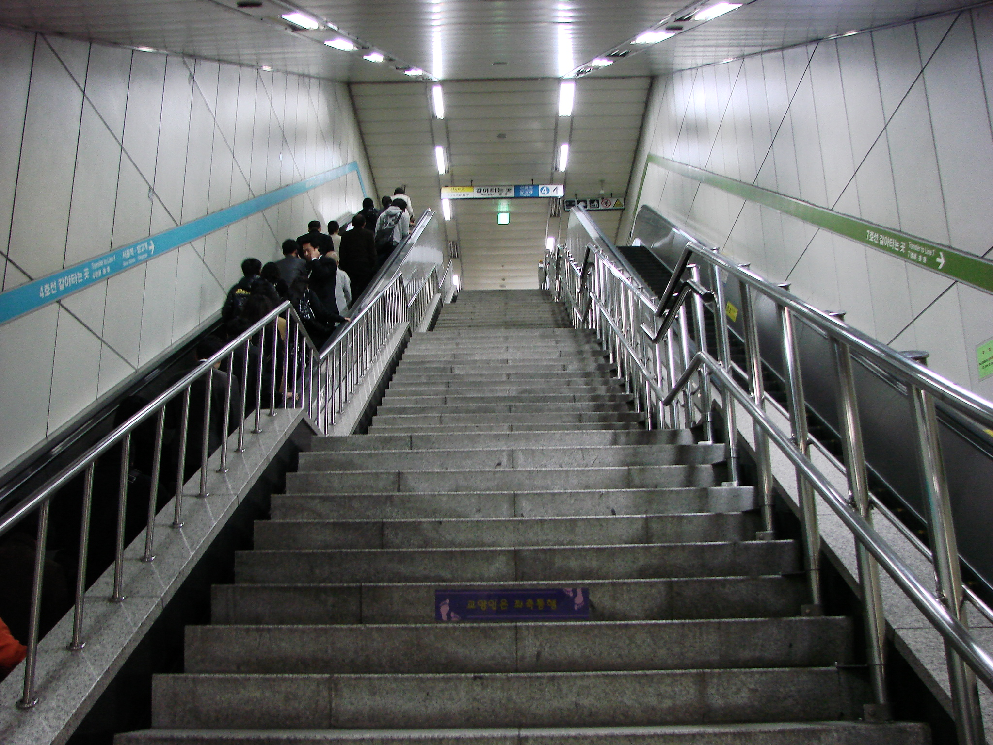 서울 지하철 4호선 이수역 환승 통로